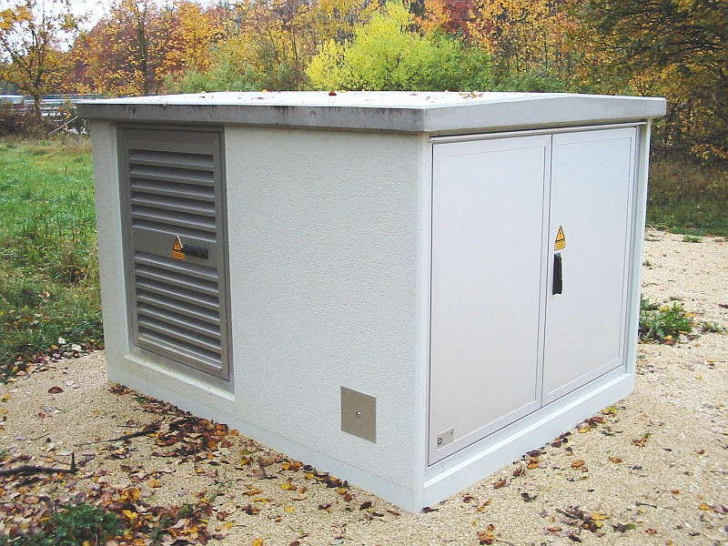 Kompakte Transformatorenstation (2005)